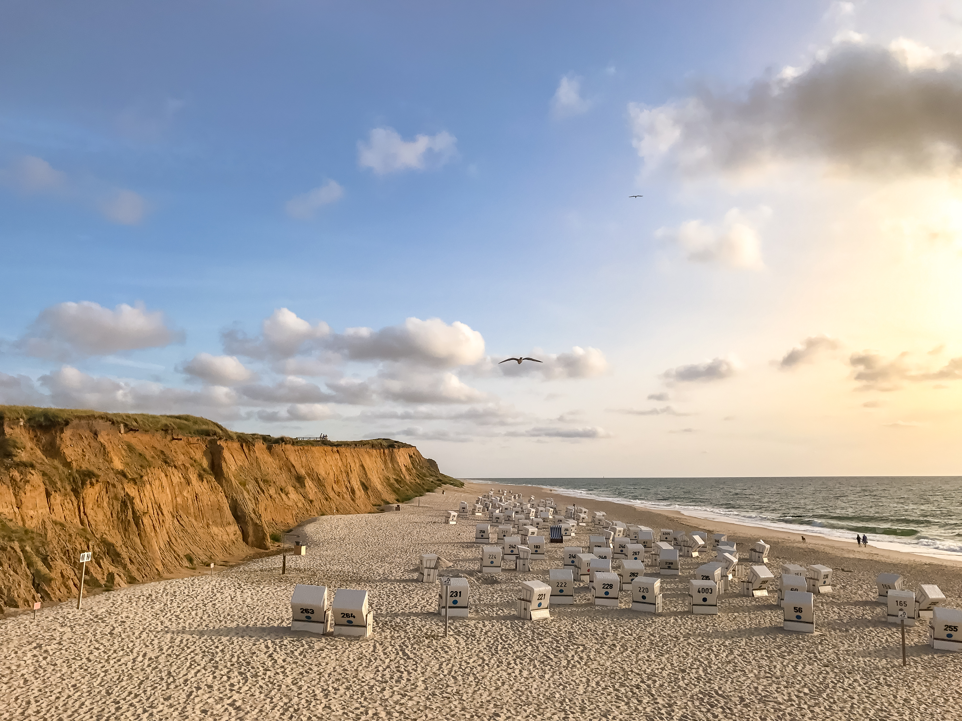 Rotes Kliff Sylt Sylt